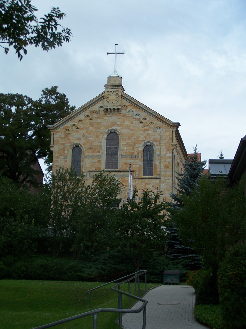 Die St.-Bonifatius-Kirche (Gotha) - Ansicht von Süden.